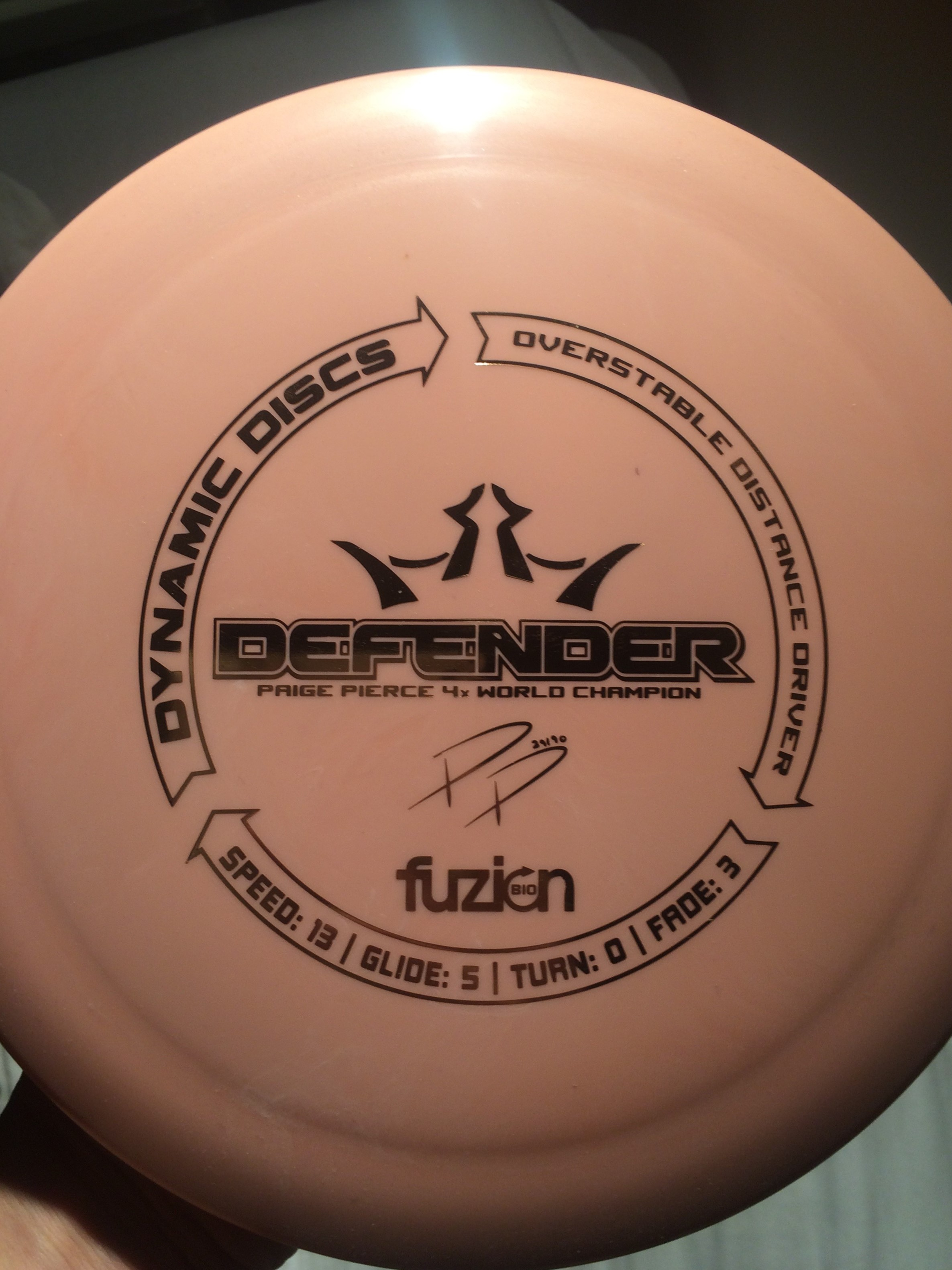 Paige Pierce 4x world champion BioFuzion Defender